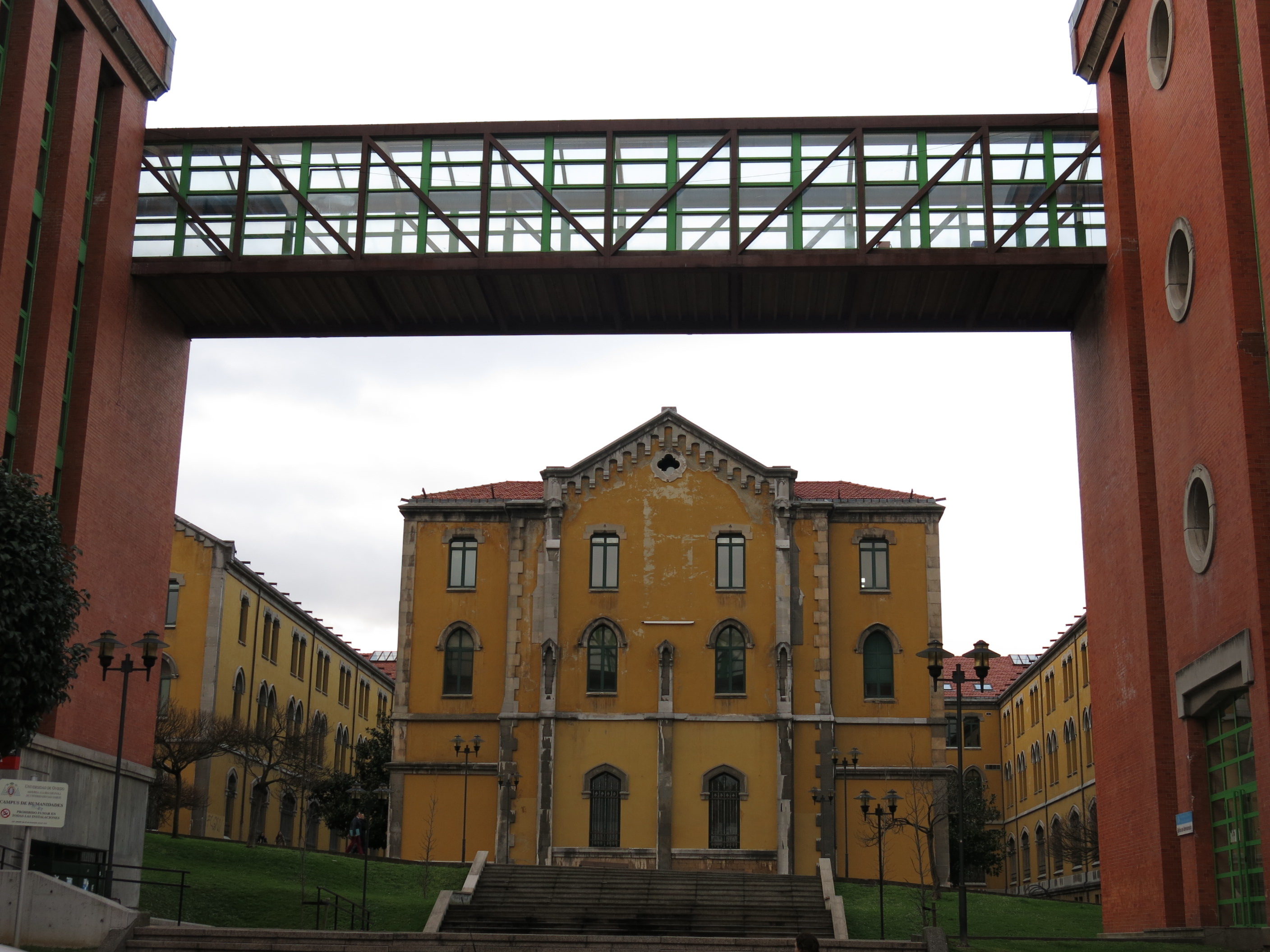 Campus de El Milán, Universidad de Oviedo, antic seminari i caserna de Pelayo